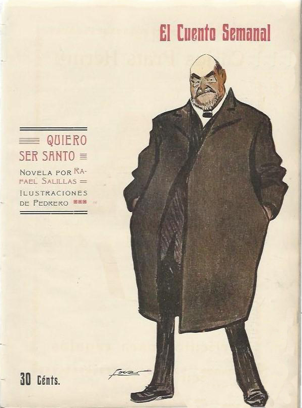 Quiero ser santo, novela de Rafael Salillas, ilustraciones de Pedrero.